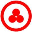 Знамя Мира